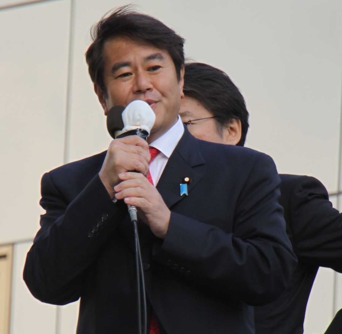 原口一博。有楽町マリオン前での街頭演説にて撮影。 Kazuhiro Haraguchi, Member of the Ministry of Internal Affairs and Communications, made a speech at Yūrakuchō Center Bldg. in Chiyoda Ward, Tōkyō Metropolis on May 15, 2009.